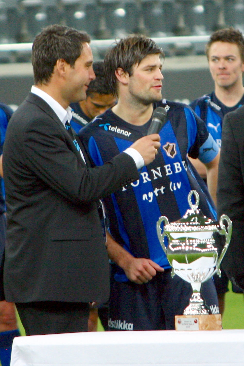 Håkon Bjercke (mediasjef i Stabæk) stiller et par spørsmål til kaptein Morten Morisbak Skjønsberg etter Stabæks seier i Superfinalen 2009.